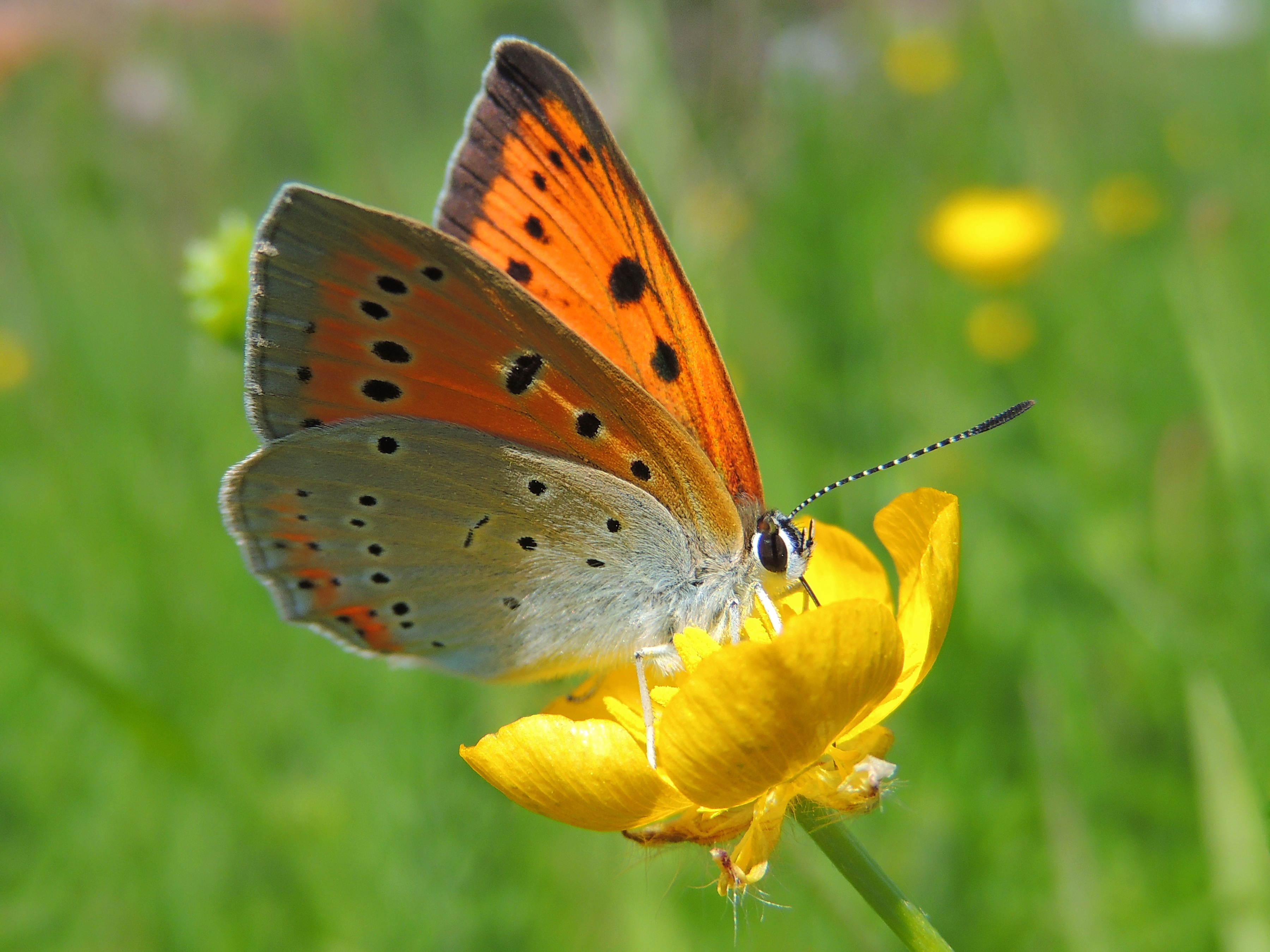 large copper großer Feuerfalter